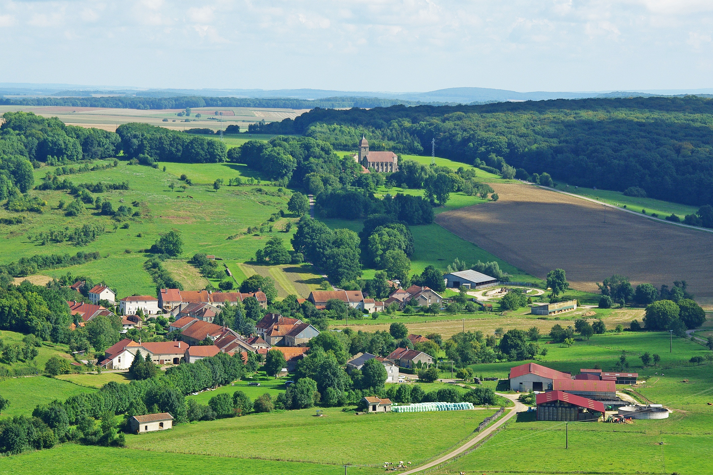 vue d ensemble de Molay depuis la montagne de la roche